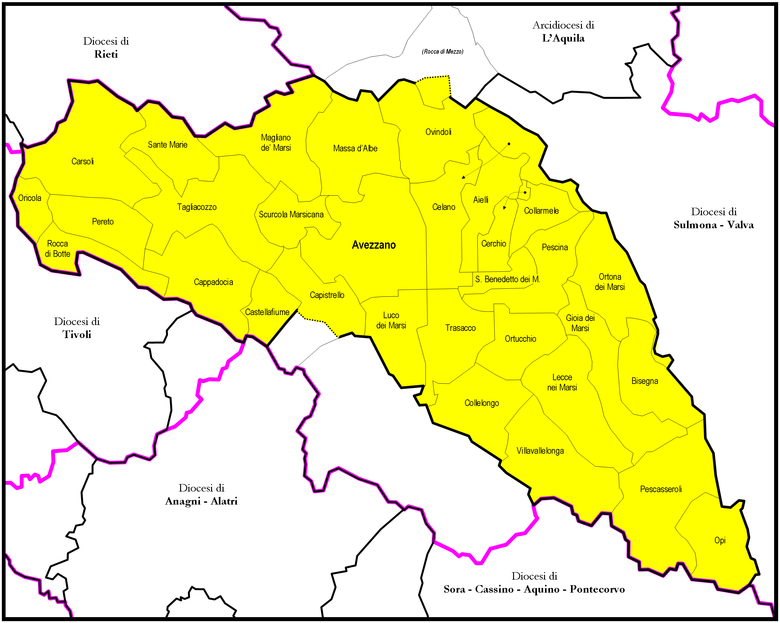 Mappa della Diocesi di Avezzano